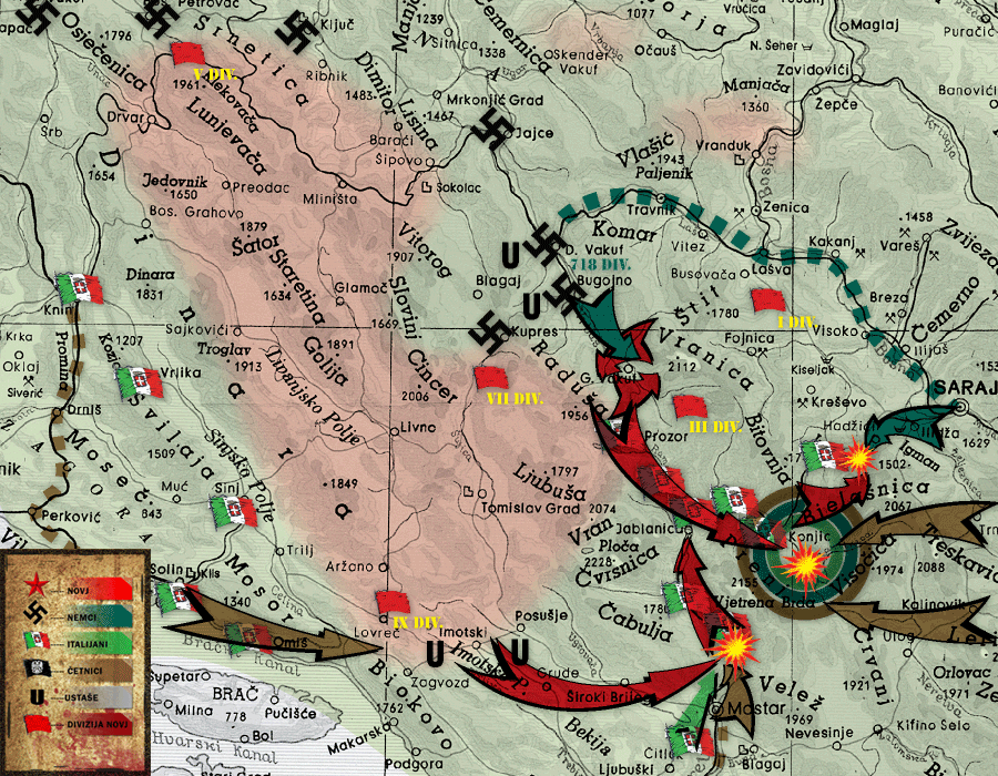 Након пораза који су претрпели у долини Неретве, Италијани су одлучили да своје снаге ојачају четницима. Црногорске четнике пребацили су возовима из Никшића у Мостар, а Баћовићеву групу у Сплит, одакле су ови почели концентрично наступање.